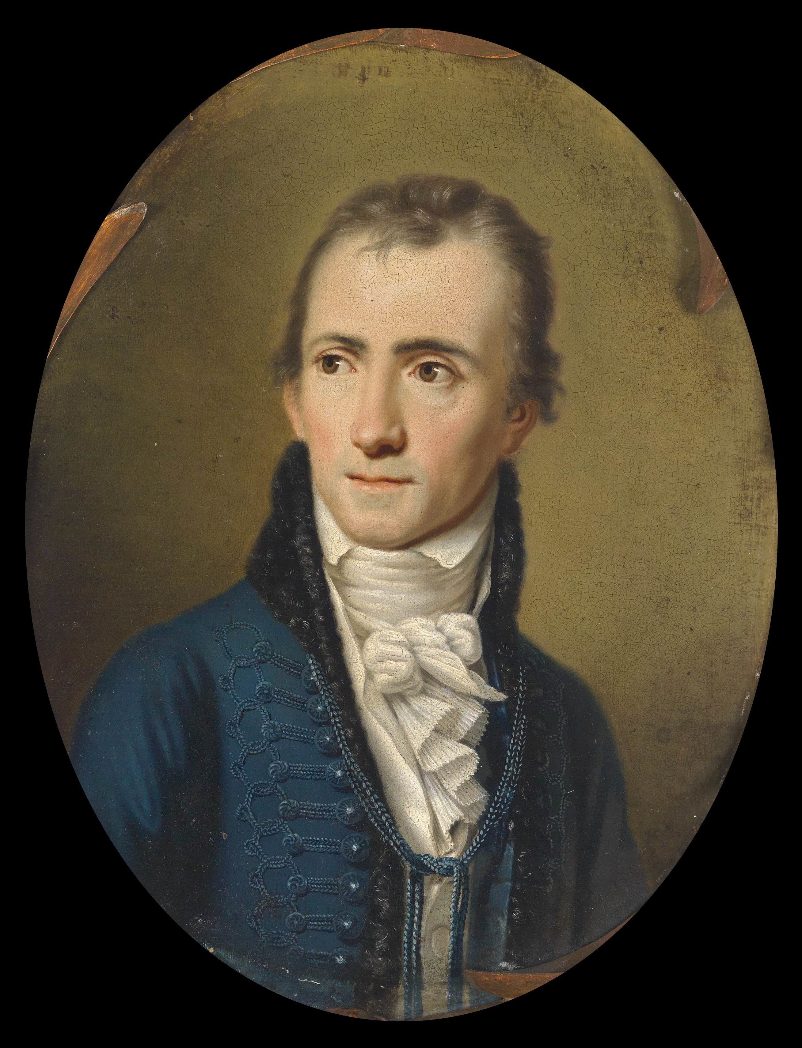 Porträt des ungarischen Dichters Ferenc Kazinczy von Kasincz und Alsóregmecz (1759-1831), rückseitig mit dem Namen des Dargestellten beschriftet, Öl auf Leinwand, 34 x 28 cm, österreichische Schule des späten 18. Jahrhunderts